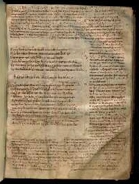 page of the codex